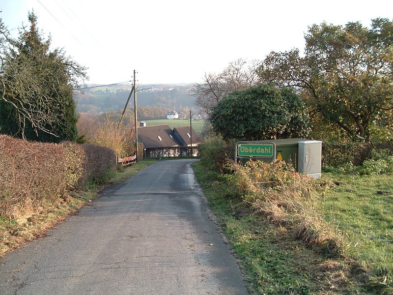 Orteingang von Oberdahl in Radevormwald Fotografiert von Benutzer:Taube Nuss im November 2004